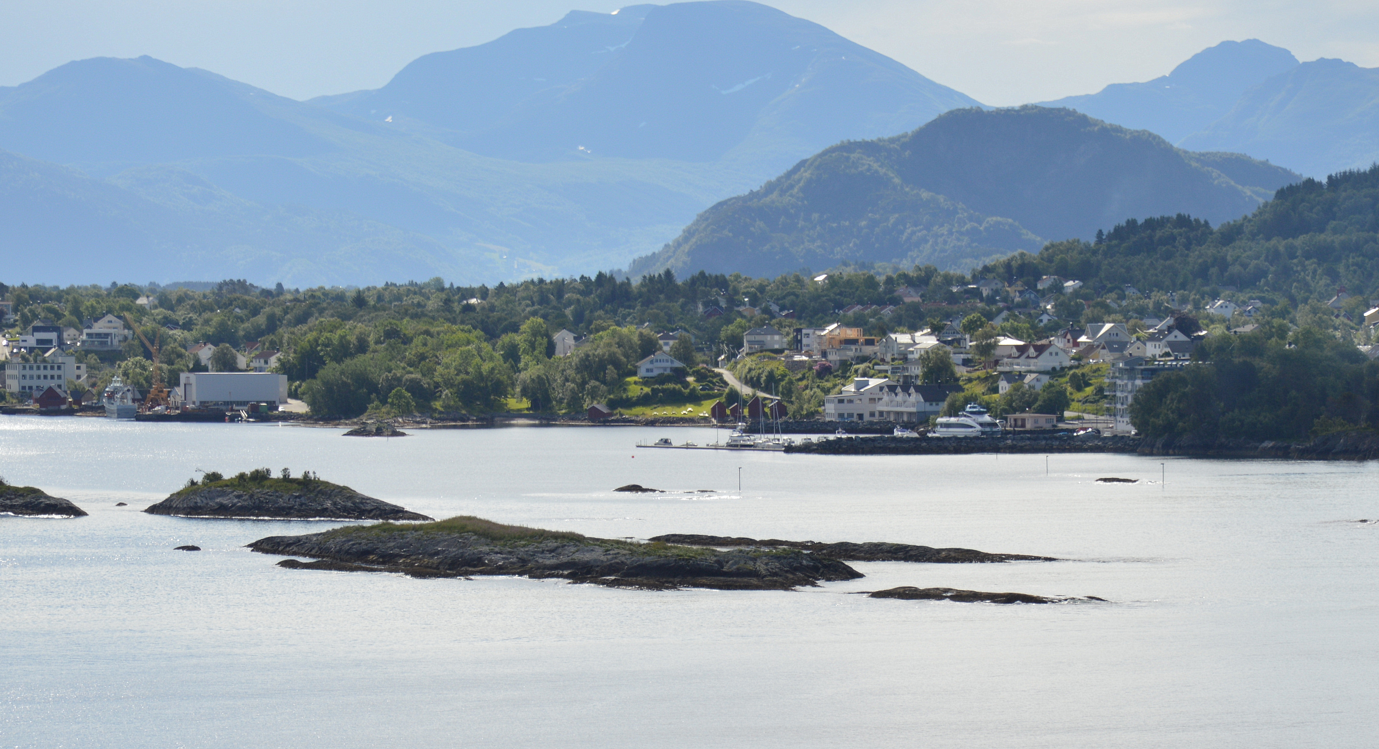 Blick auf den Ort Langevag auf Sula